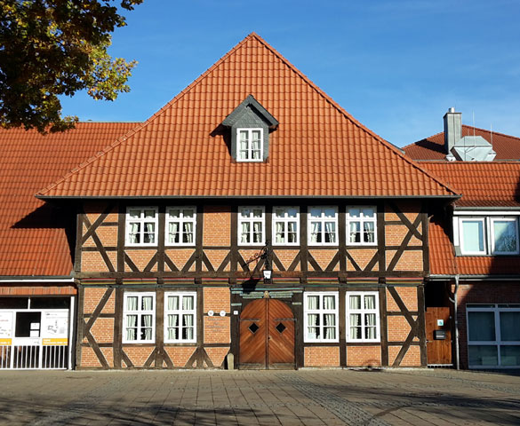 Im Jahr 208 zog das Heimatmuseum Seelze vom Seelzes Ortsteil Letter in das alte Zentrum der Kernstadt Seelze um. Dort hat es Räume im Fachwerkhaus "Alter Krug".